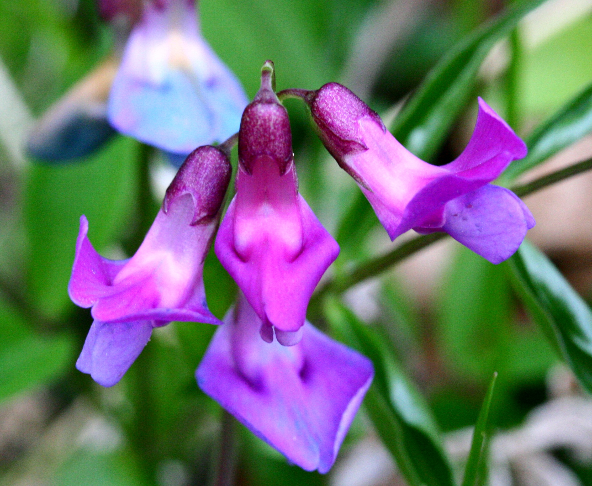 Lathyrus_vernus (Cicerchia primaticcia)